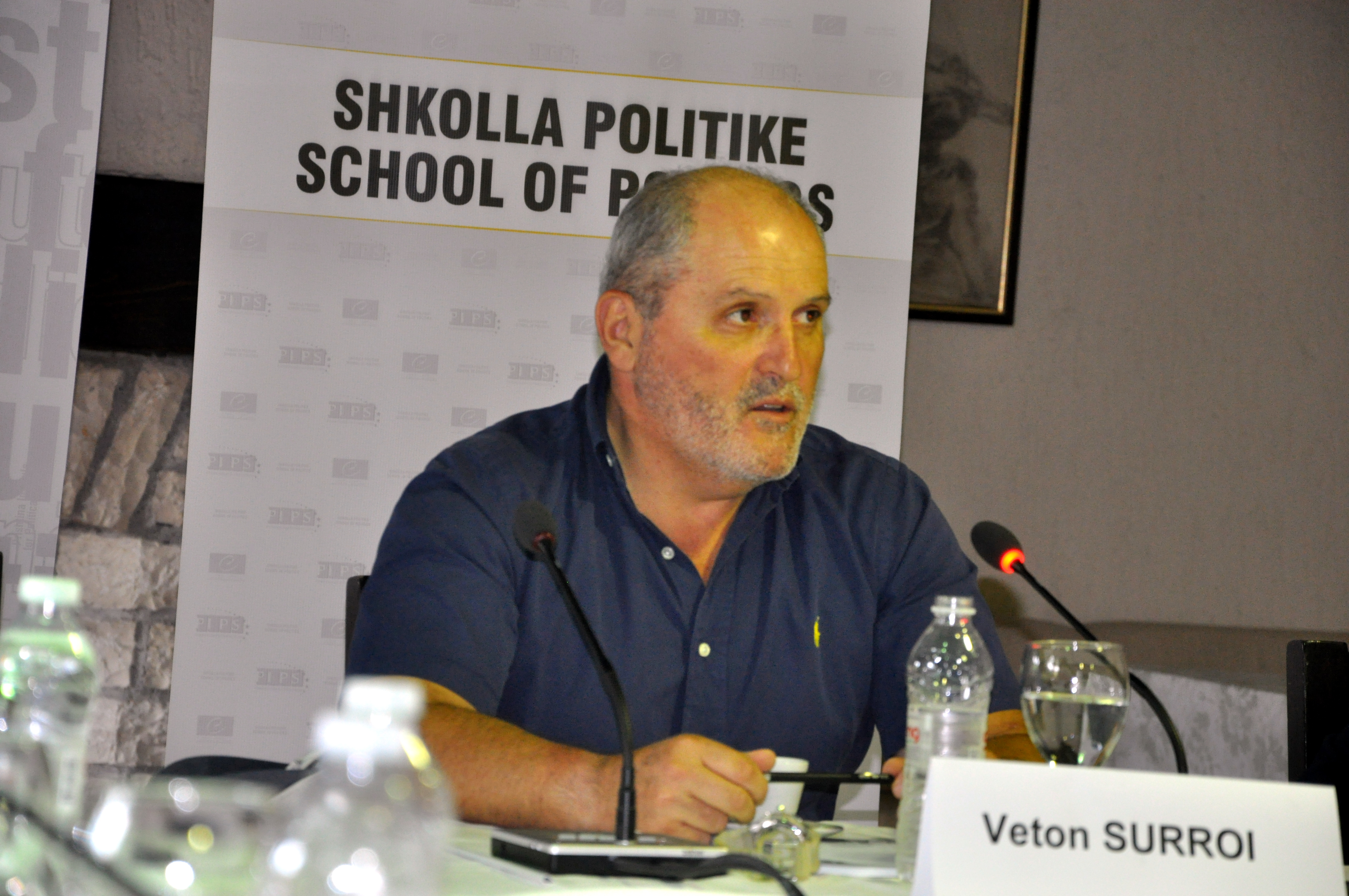 Veton Surroi